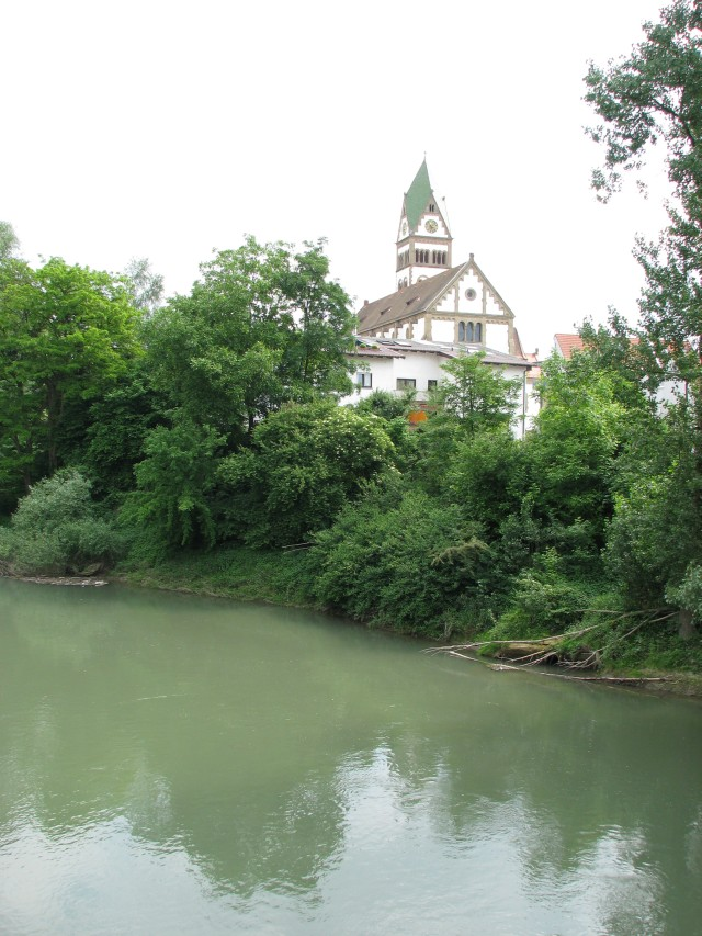 Ketsch